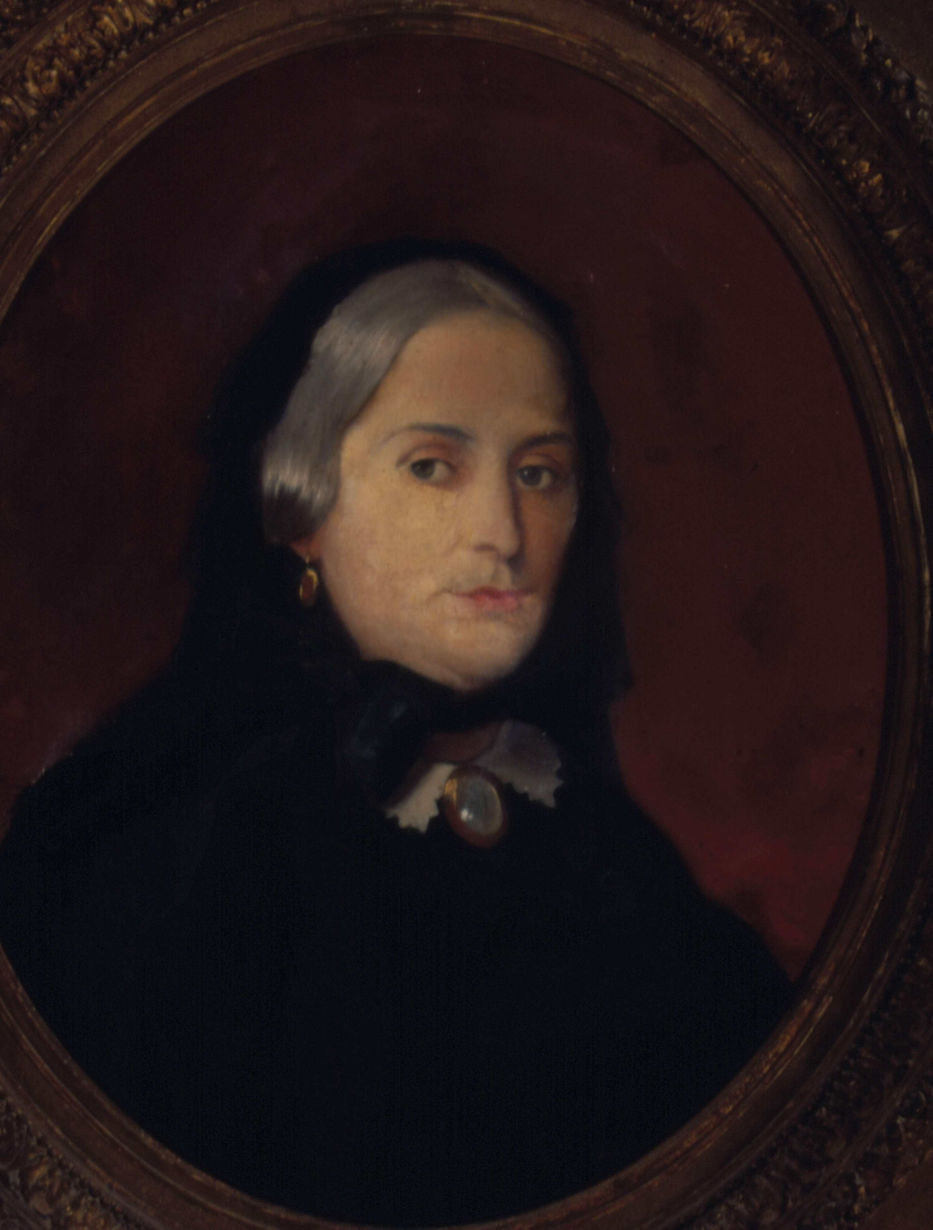 Obra que integra o acervo do Museu Paulista da USP.